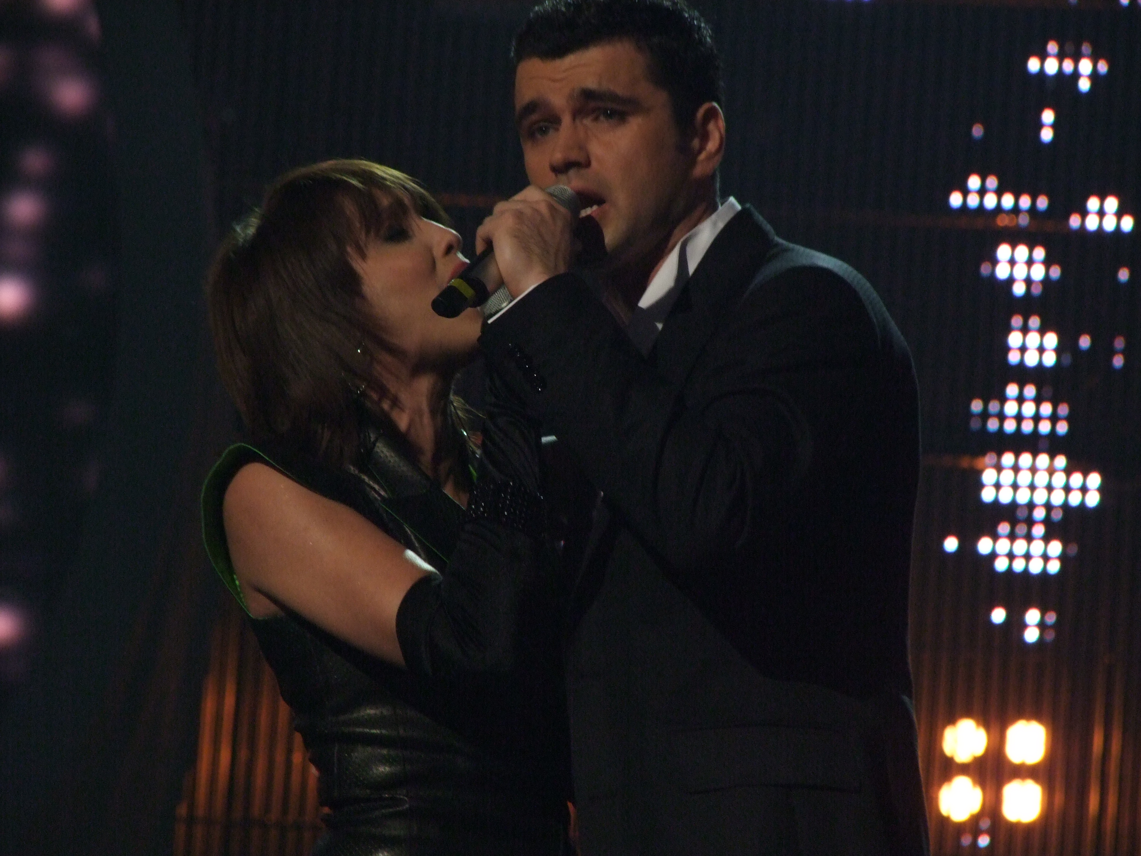 Semifinal 1 EUROVISION 2008